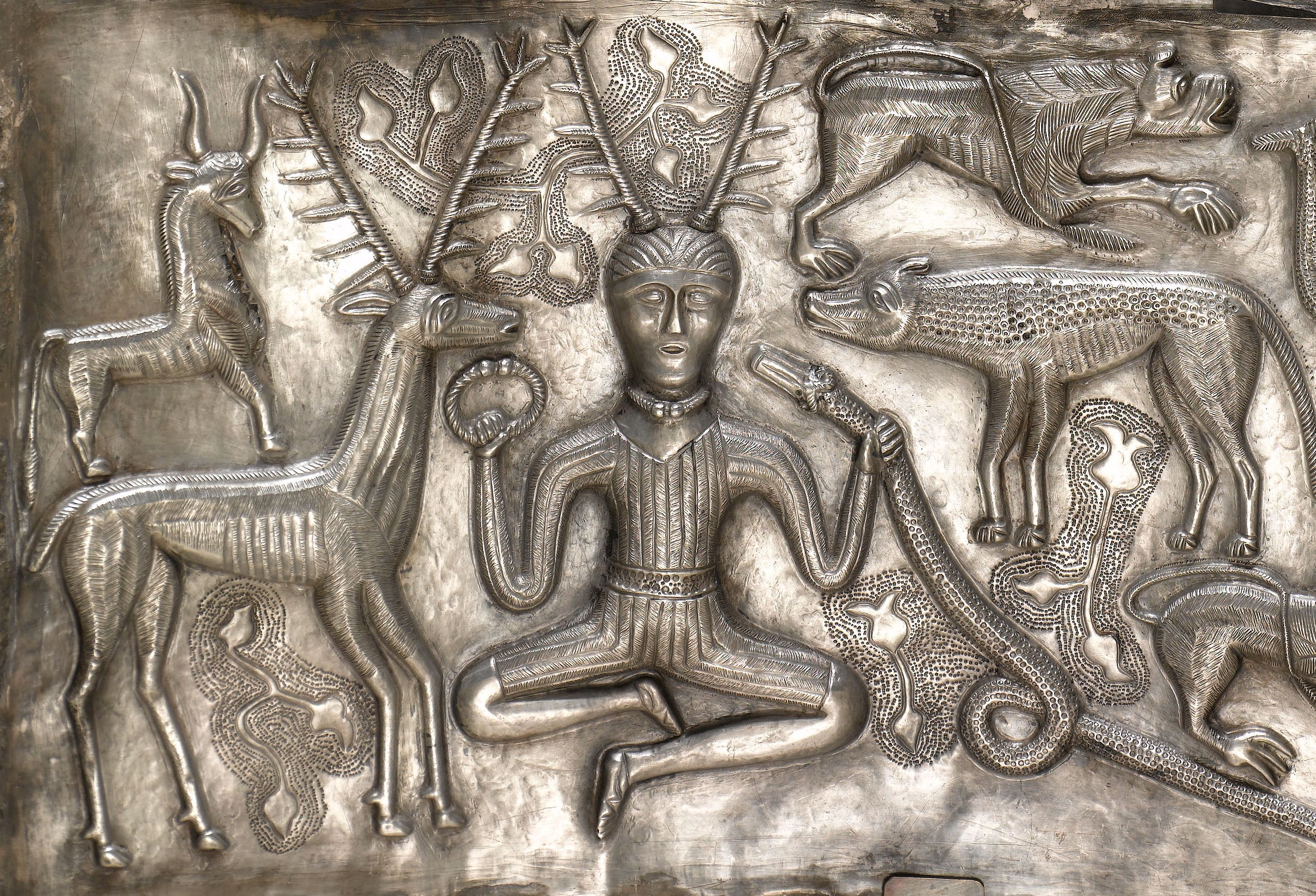 Gundestrupkedlen, inderside Beskrivelse Gundestrupkedlen, inderpladerne, Y.FRJ, Rævemosen, Ålborg Amt